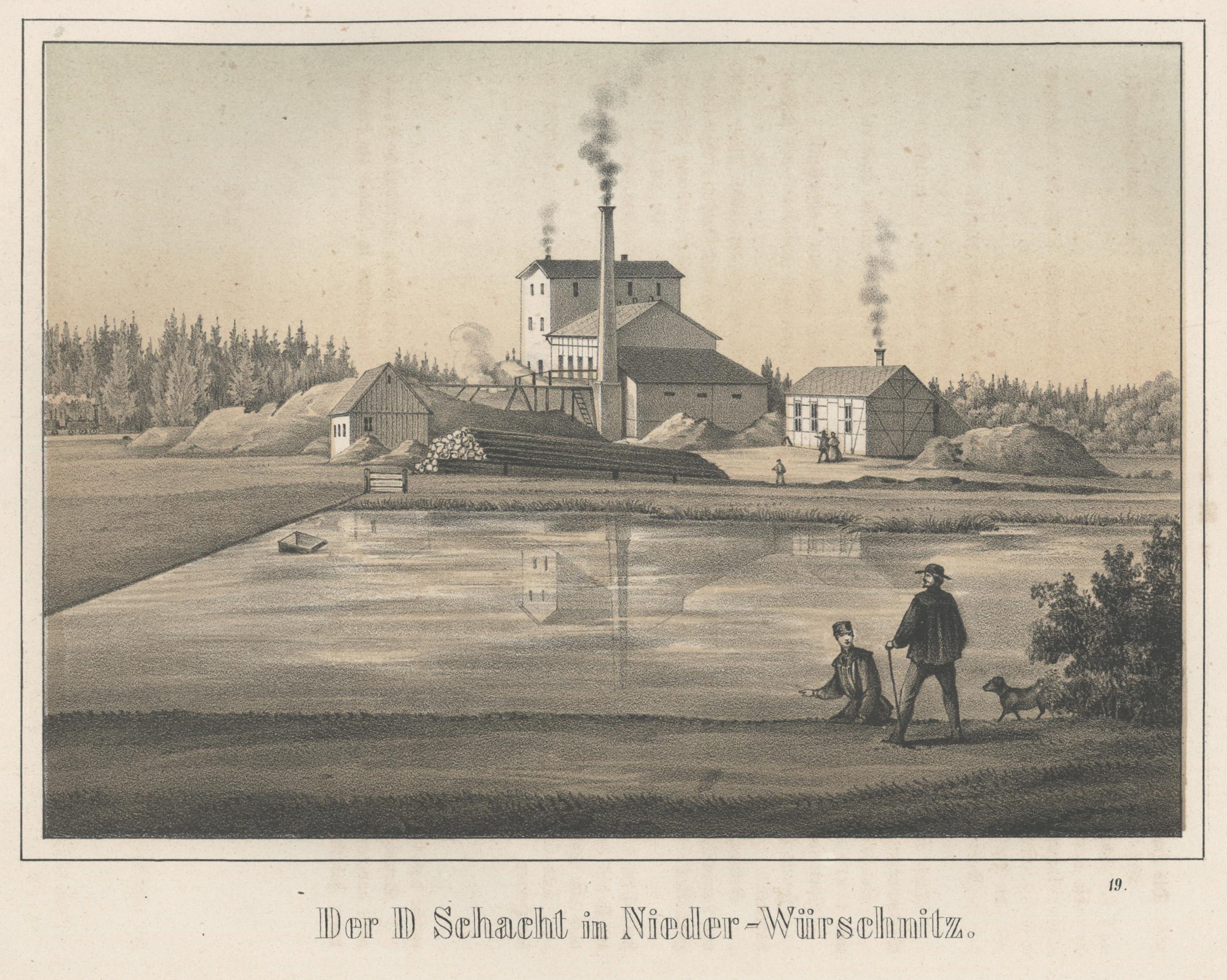 Der D Schacht in Nieder-Würschnitz aus: Album der Sächsischen Industrie Zweiter Band